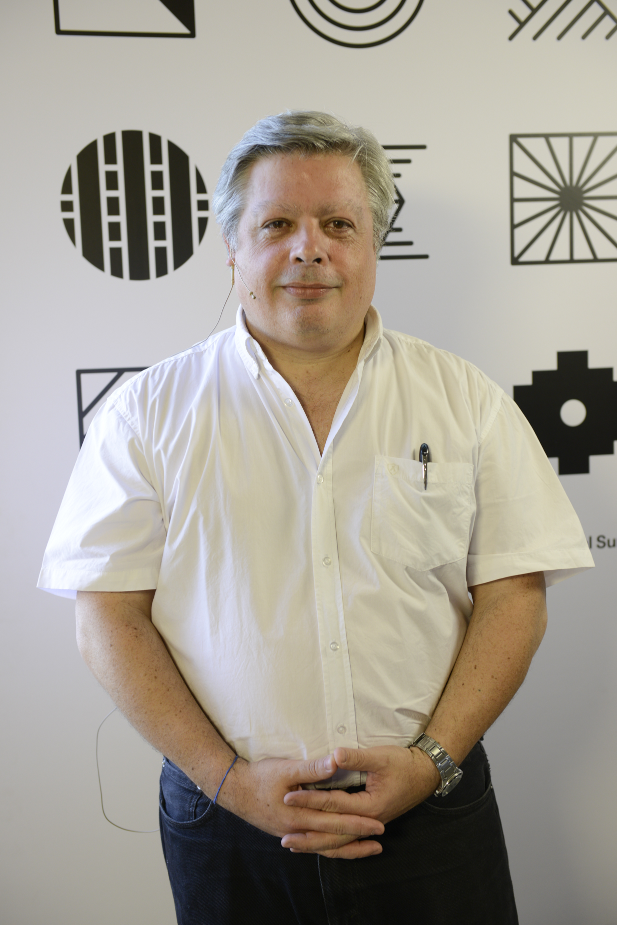 Fotografías de los invitados y participantes de la Bienal Sur 2016, realizada por la Universidad de Tres de Febrero.